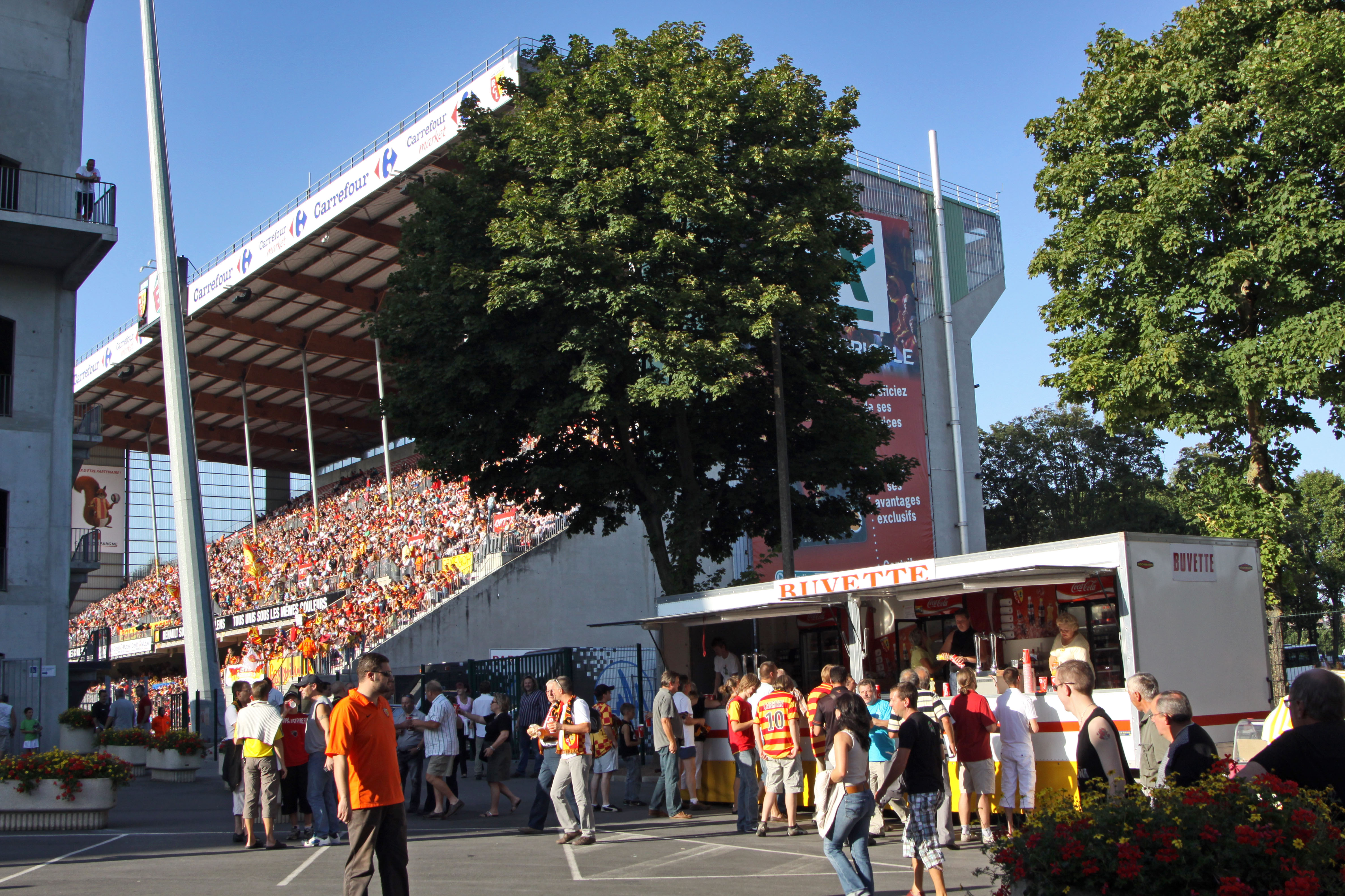 Buvette au Stade Bollaert de Lens.